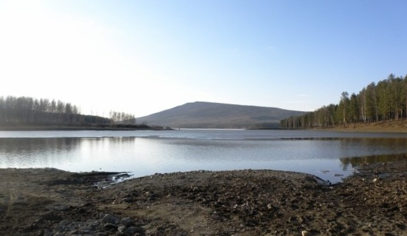 Вид на гору Качканар со стороны Нижневыйского пруда